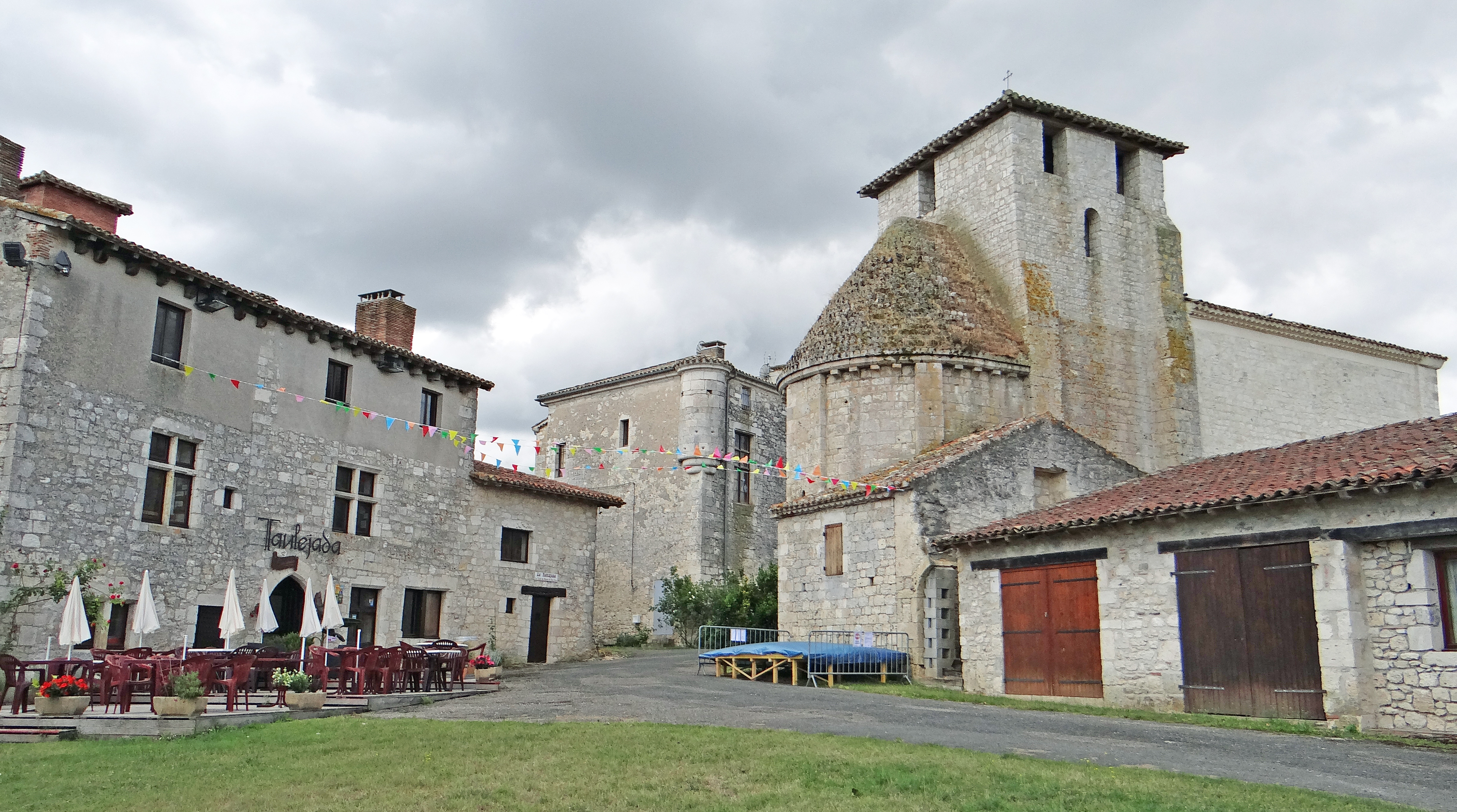 Château de Frespech et église